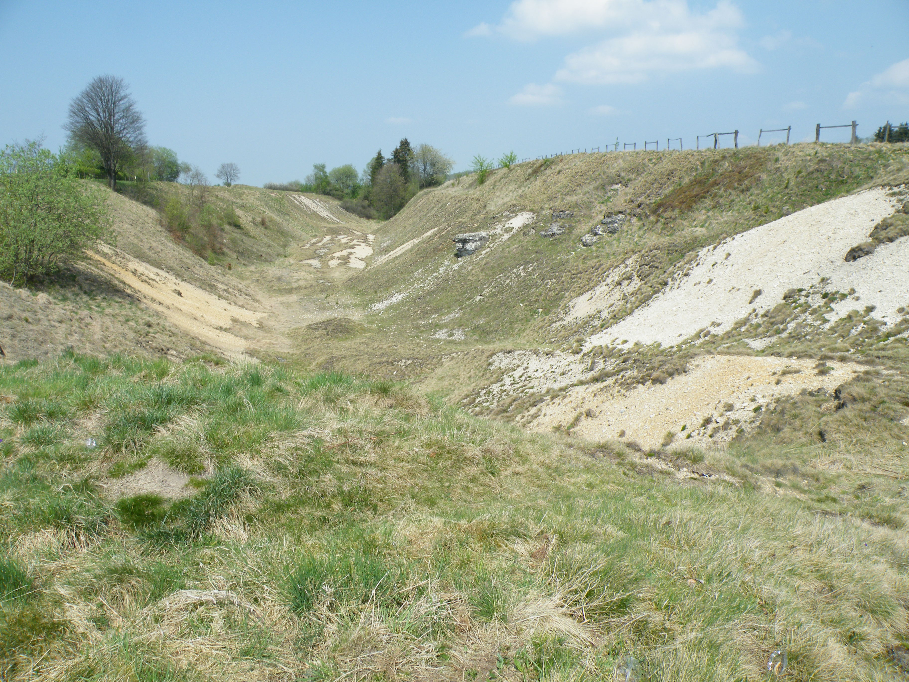 Blick den Tagebau von Süden. Dieser Teil der Bleikuhlen gehört zum Naturschutzgebiet Bleikuhlen.